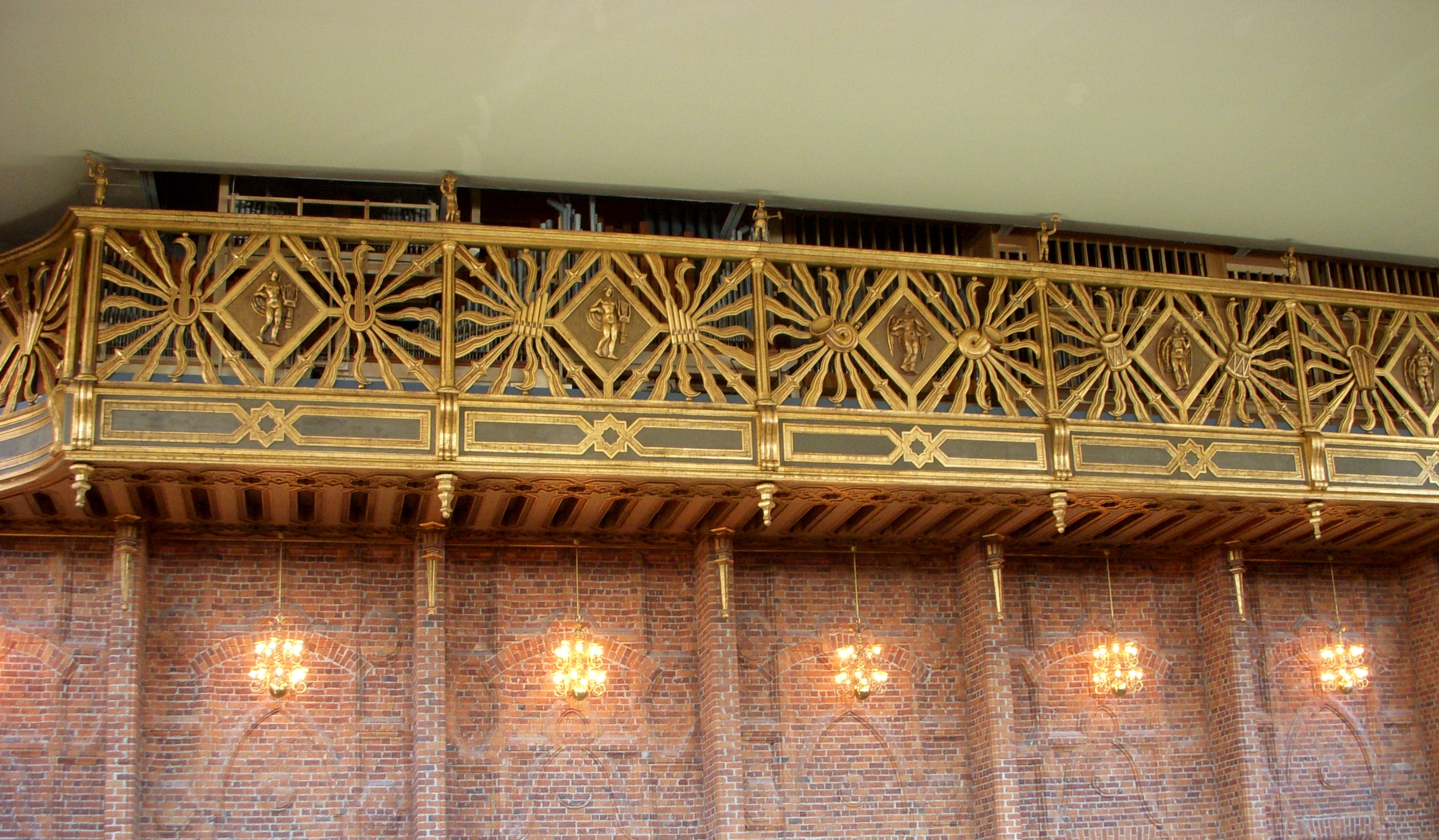 Stockholms stadshus, "Blå hallen" med orgelläktaren